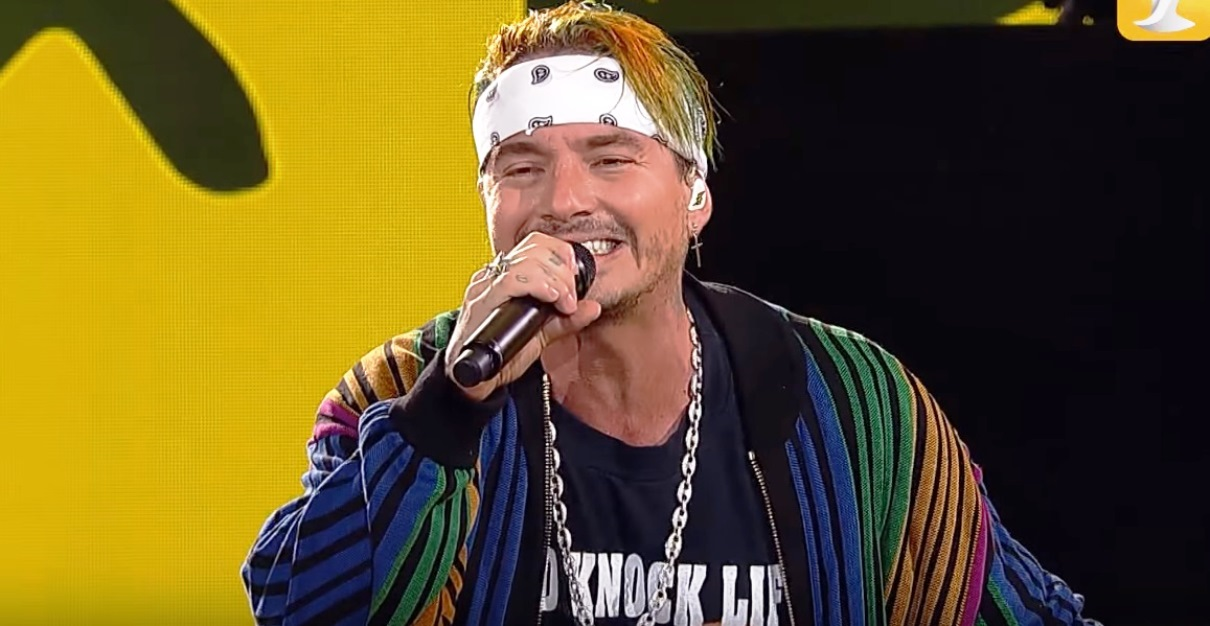 Directamente desde Medellín, Colombia, José Álvaro Osorio Balvin, conocido por su nombre artístico como J BALVIN, se presenta por primera ante el público chileno eligiendo al “monstruo” de la Quinta Vergara como primer jurado de su show, entregando una performance sobre el escenario que mantuvo encendida a las más de 15 mil personas que asistieron a esa noche de cierre del Festival de Viña 2017.